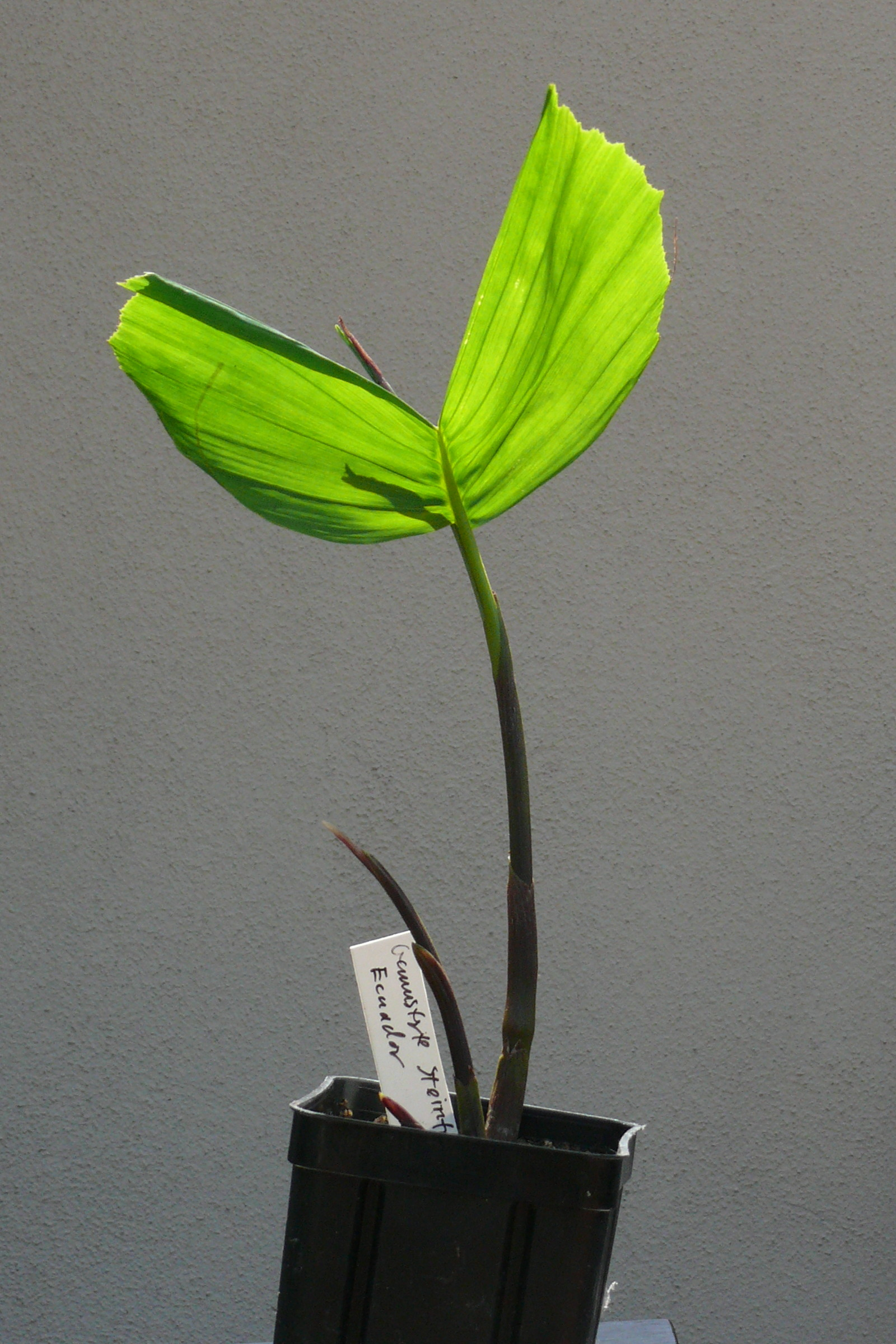 Iriartea deltoidea, angezogen aus einem Samen mitgebracht aus dem Regenwald in Ekuador